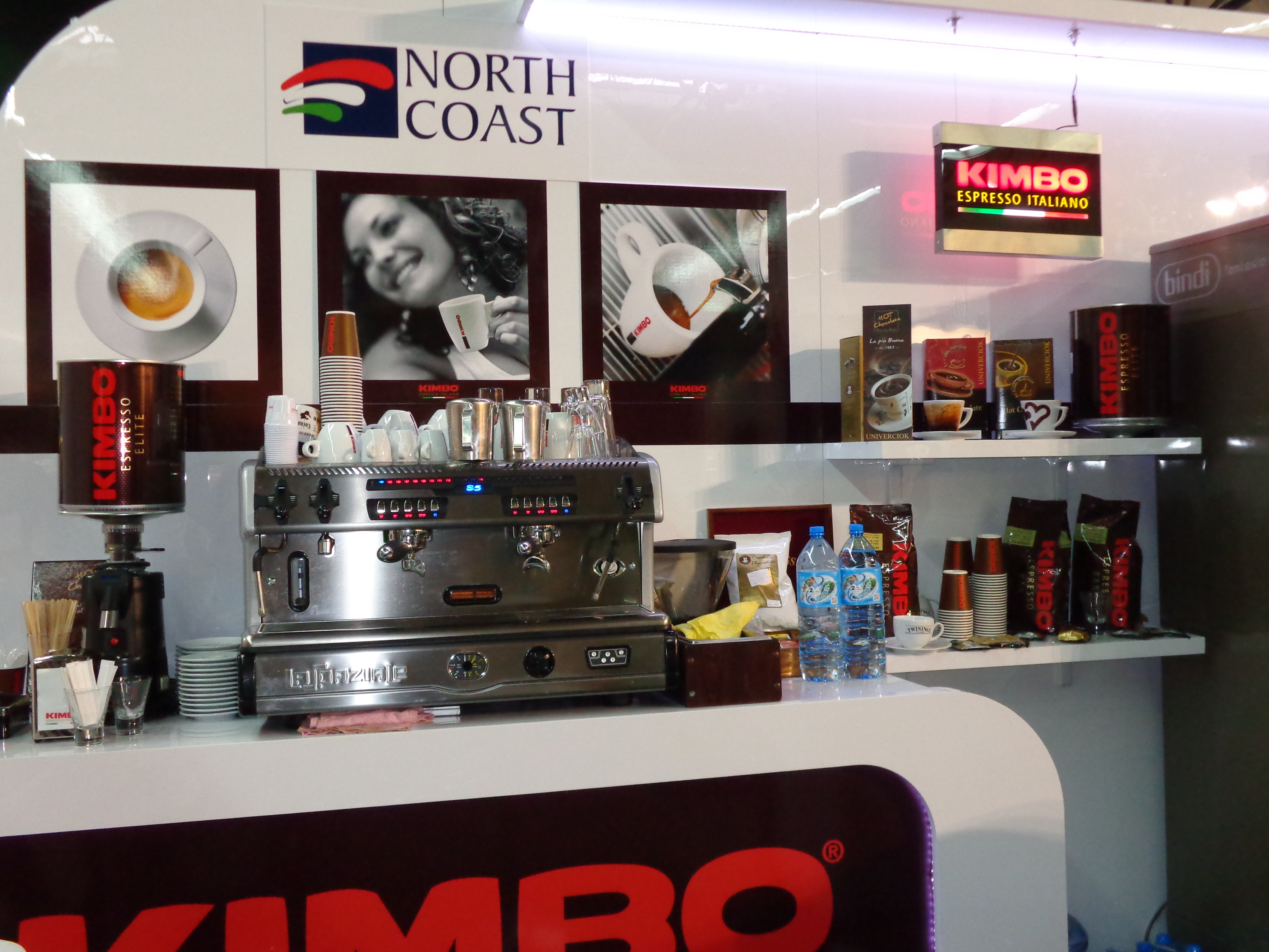 Akcesoria do kawiarni firmy "Kimbo" prezentowane podczas Targów HORECA 2013 w Krakowie.